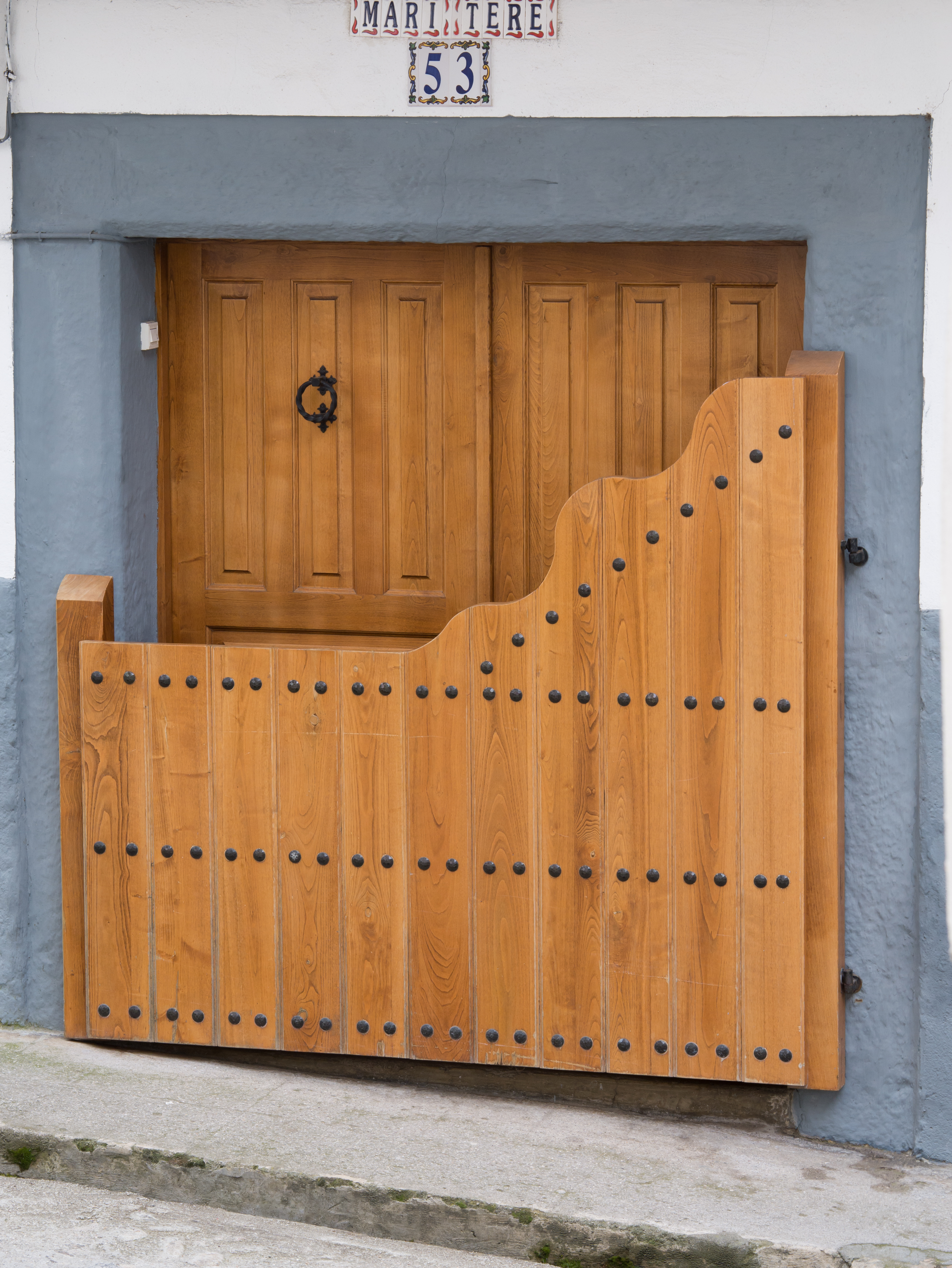 Batipuerta: puerta tradicional en Calendario. Salamanca, Castilla-León, España